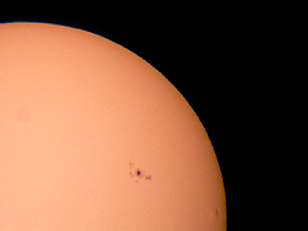 Sun Spots